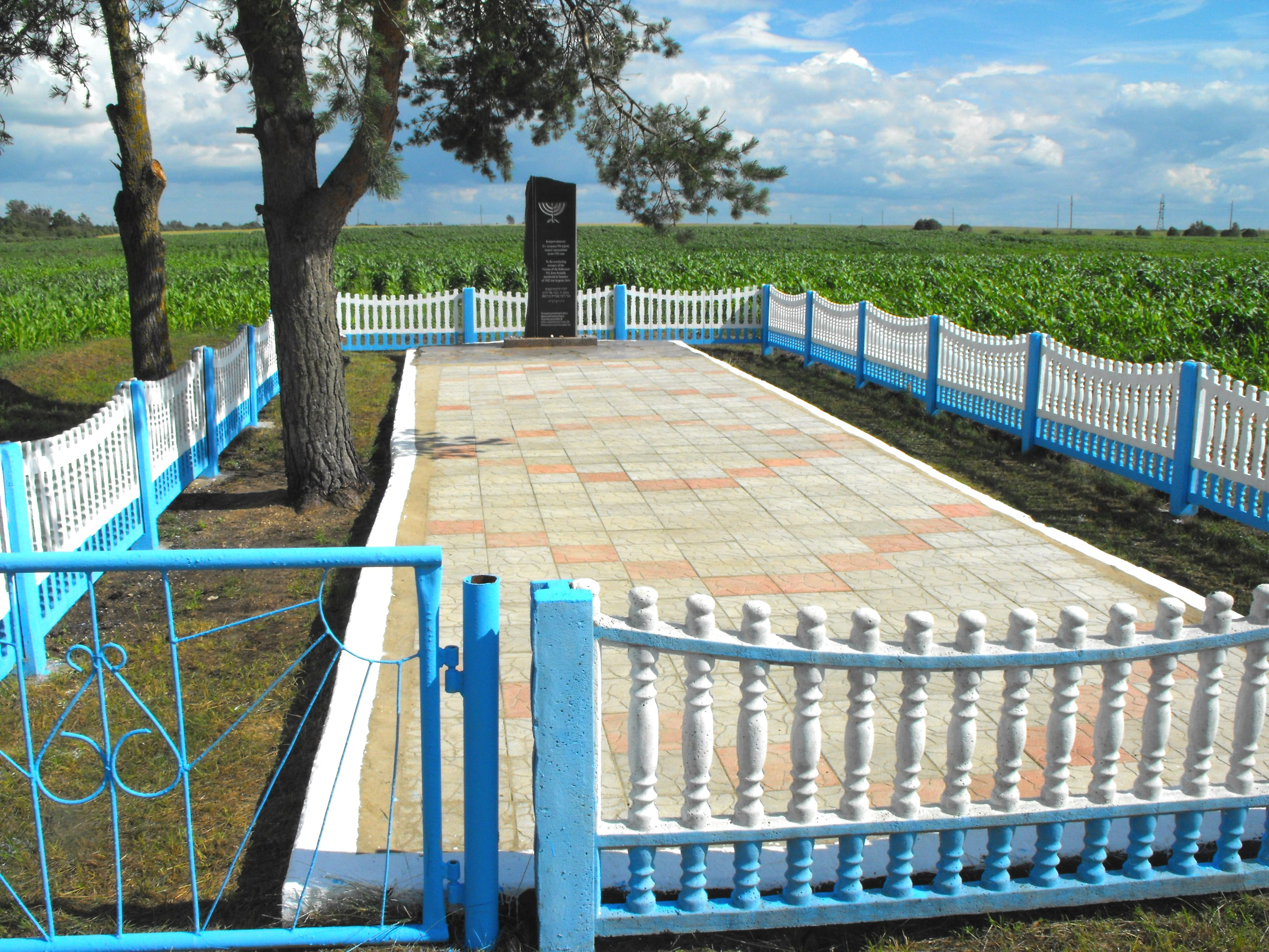 Памятник на месте расстрела летом 1942 года 916 евреев - узников гетто в Лужках. Находится около деревни Лужки Шарковщинского района в 50 метрах от дороги Н3002.